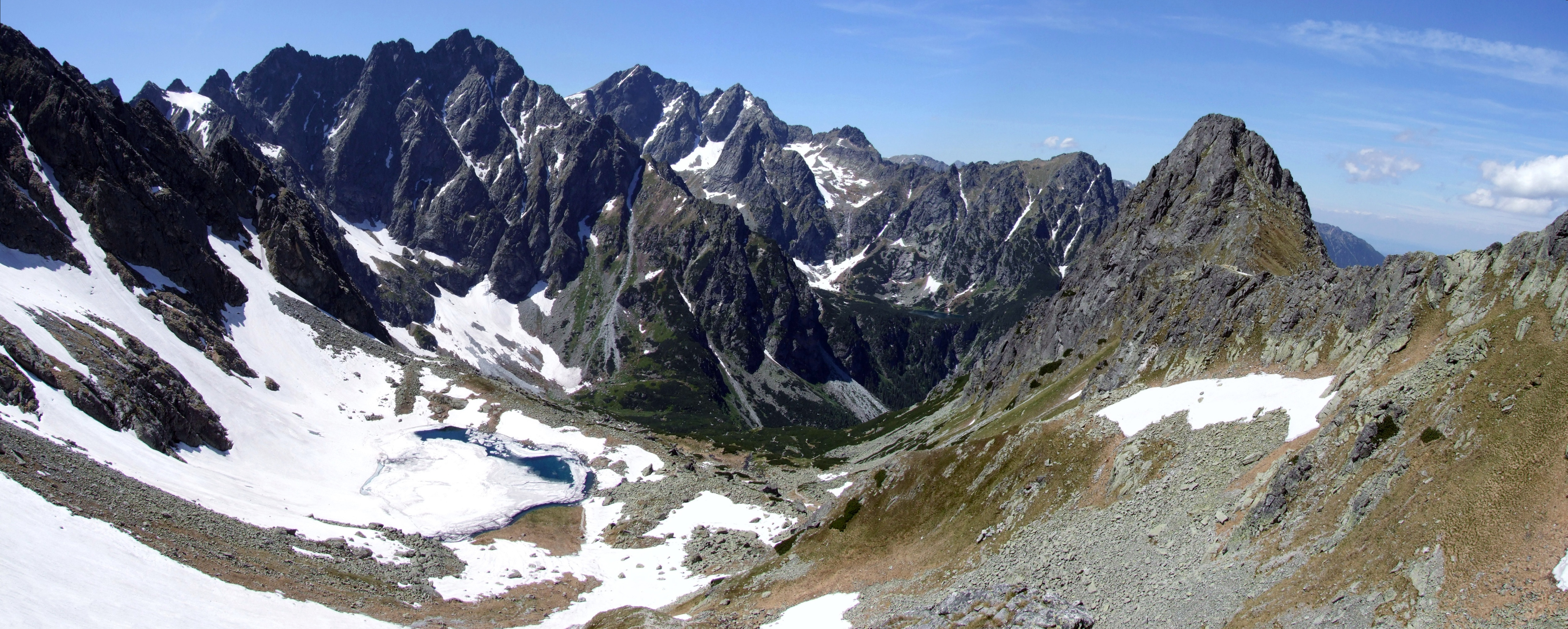 View from Mała Wysoka